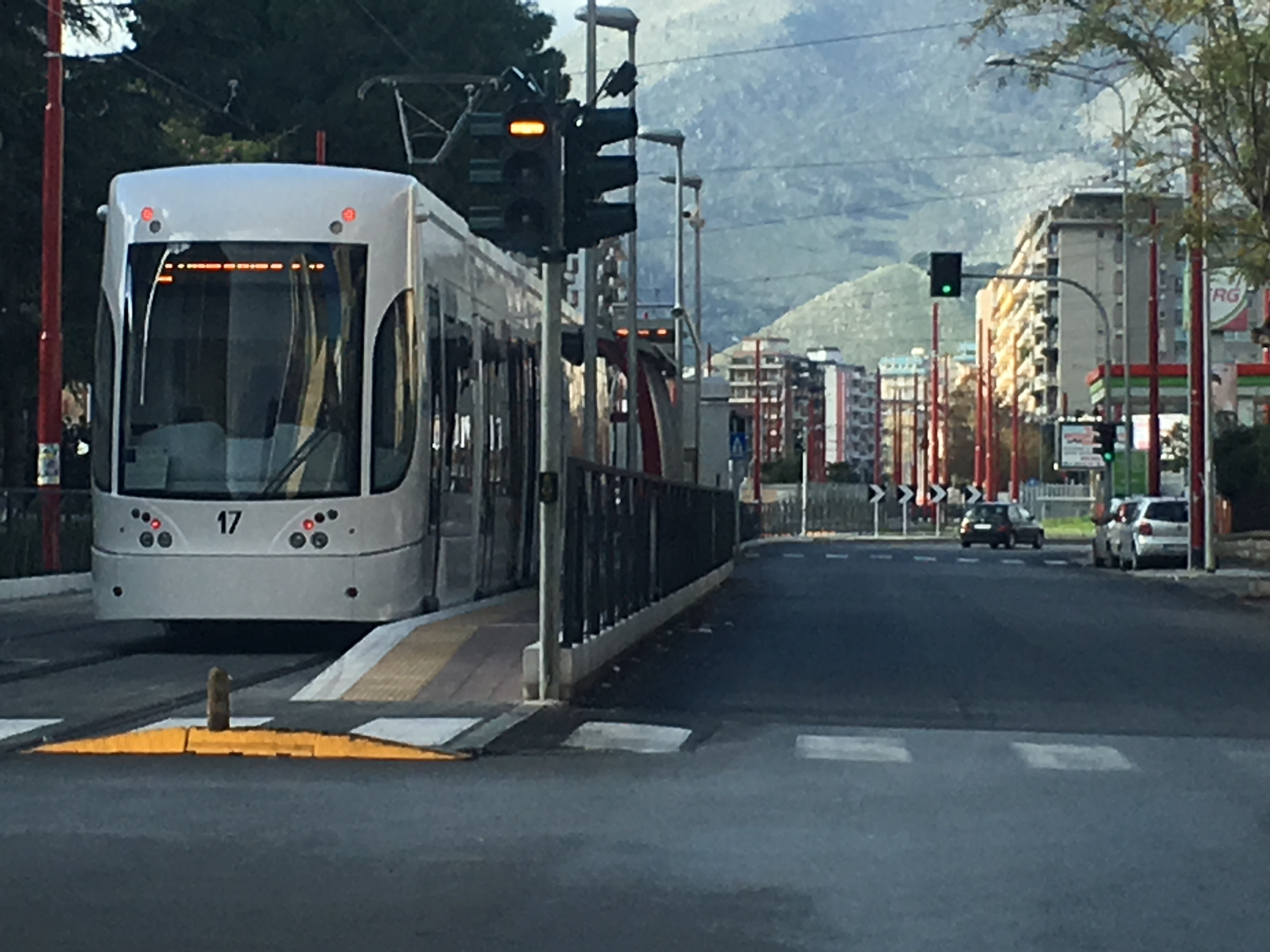 Una delle prime corse della rete tranviaria di Palermo: il tram in servizio in via Leonardo da Vinci